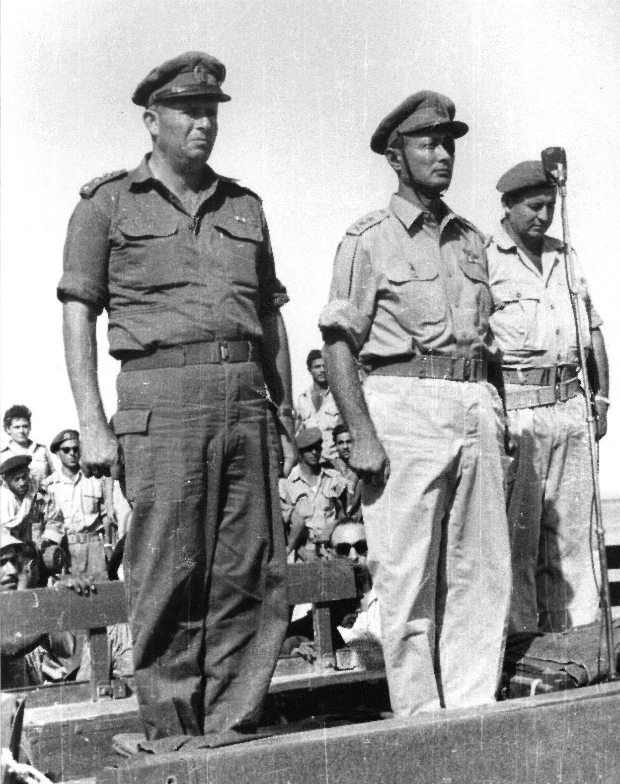 שמחוני ומשה דיין על הבמה המאולתרת מכלי רכב, במסדר הניצחון של חטיבה 9 בשארם א-שייח'. מימין: המח"ט אברהם יפה מסדר סיום של חטיבה 9 בשארם א-שייח